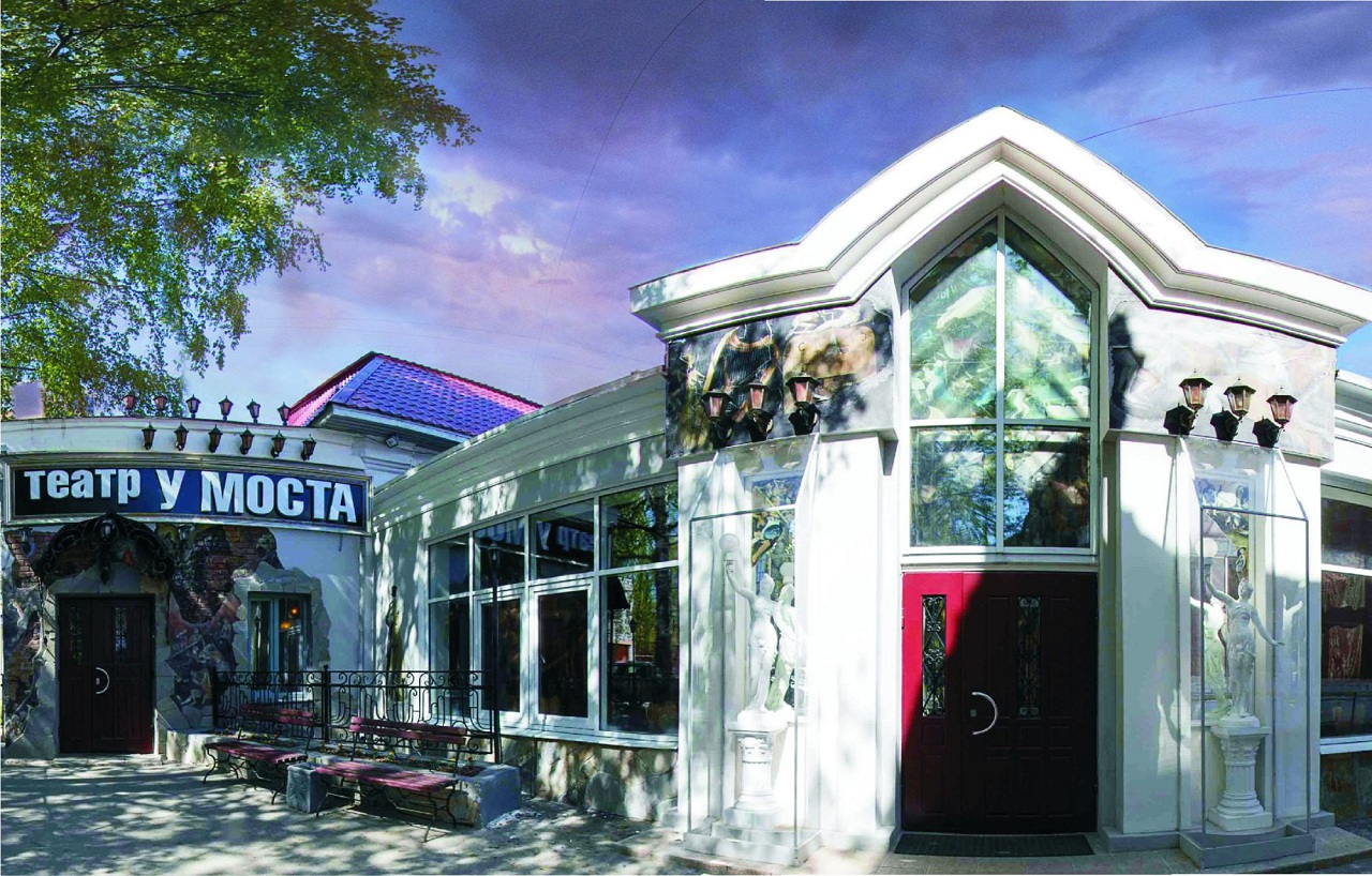 Авторский Театр «У Моста», созданный в 1988 году Сергеем Федотовым